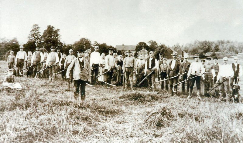 Taxinge skördedag 1896